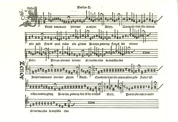 Superius/Tenor part of a setting by Tromboncino from Lamentationum Jeremie... liber primus und secundus. Published in Venezia by Ottaviano Petrucci, 1506. Museo internazionale e biblioteca della musica (Bologna).